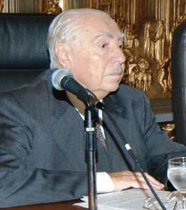 Hector Gross Espiell